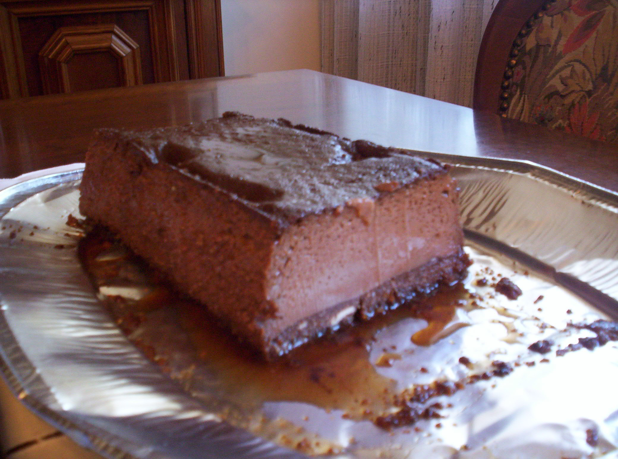 Bunet - dolce piemontese